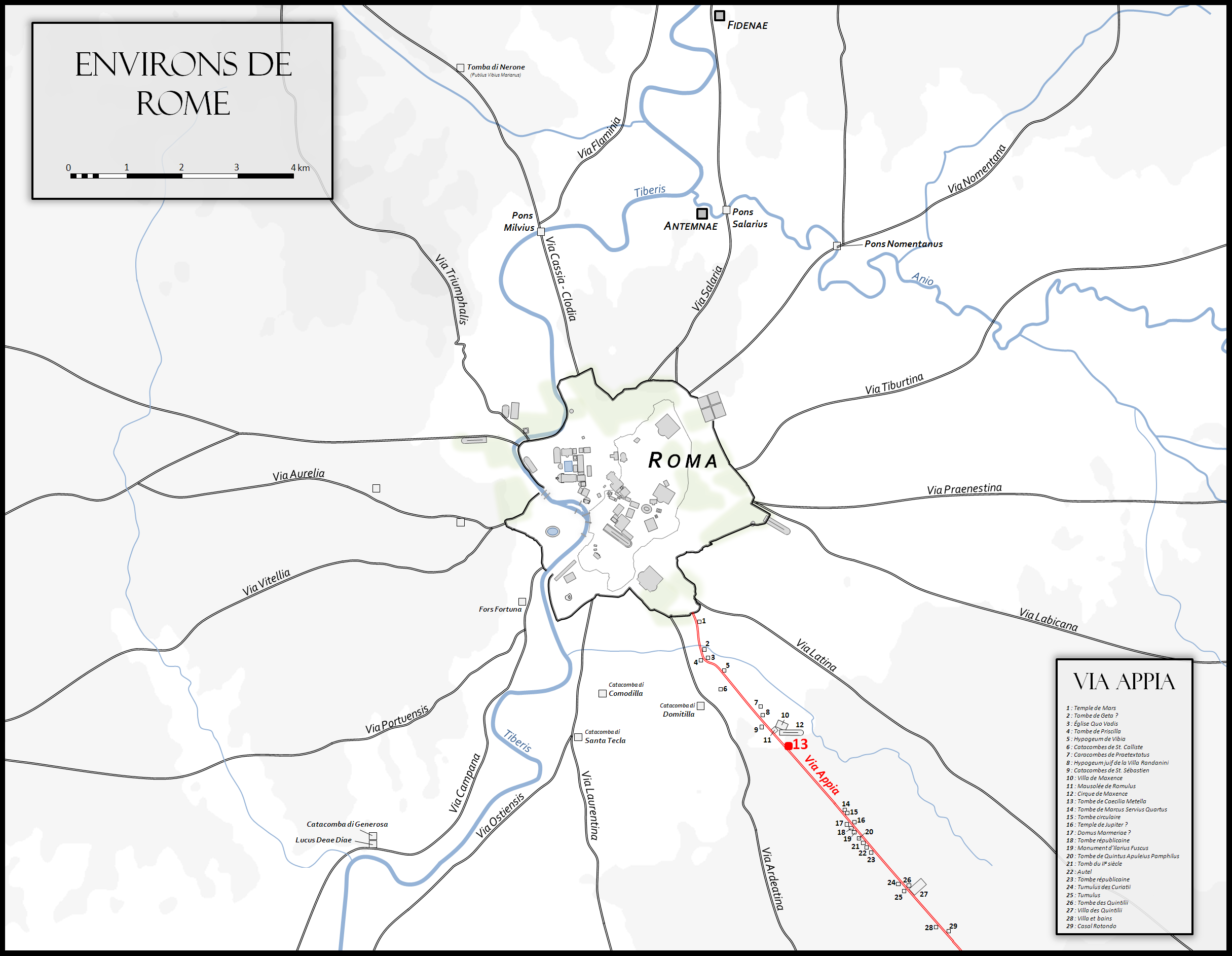 Localisation de la tombe de Caecilia Metella